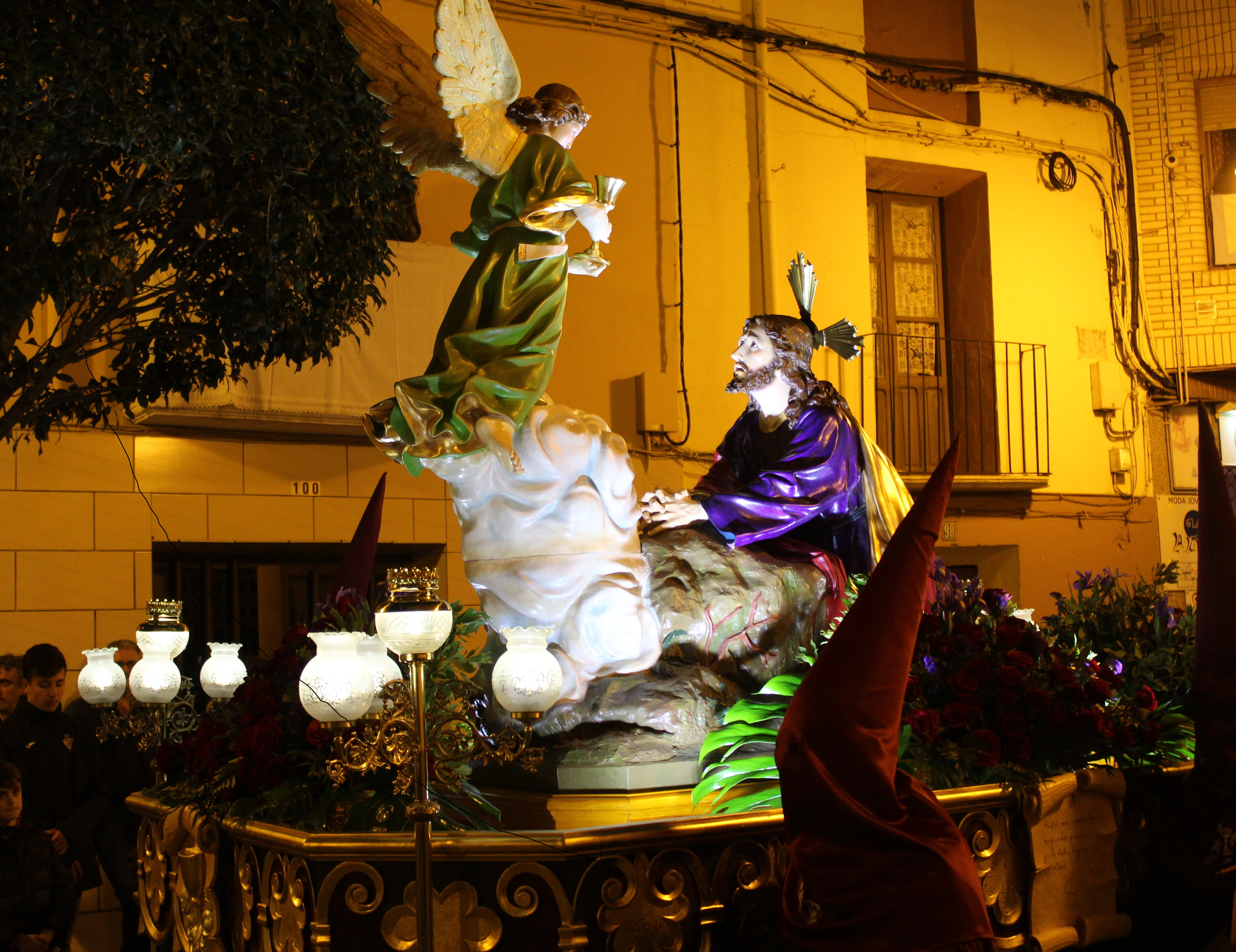 Paso de la Cofradía de la Oración del Huerto de Andorra durante la Procesión del Silencio del Jueves Santo.